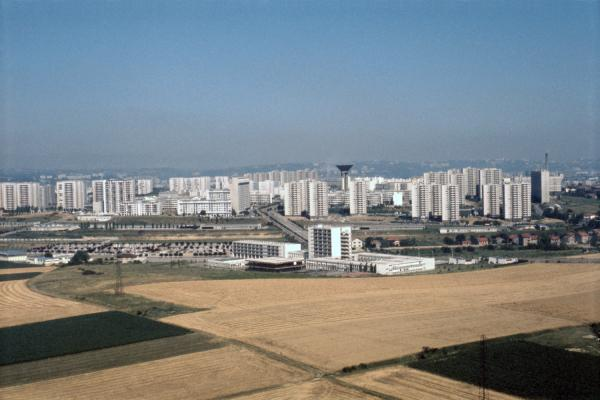 Vue aérienne de la ZUP des Minguettes.